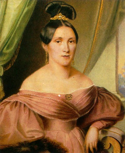 Anna Streim (1801-1870), moglie del compositore Johann Strauss sr. (1804-1849)